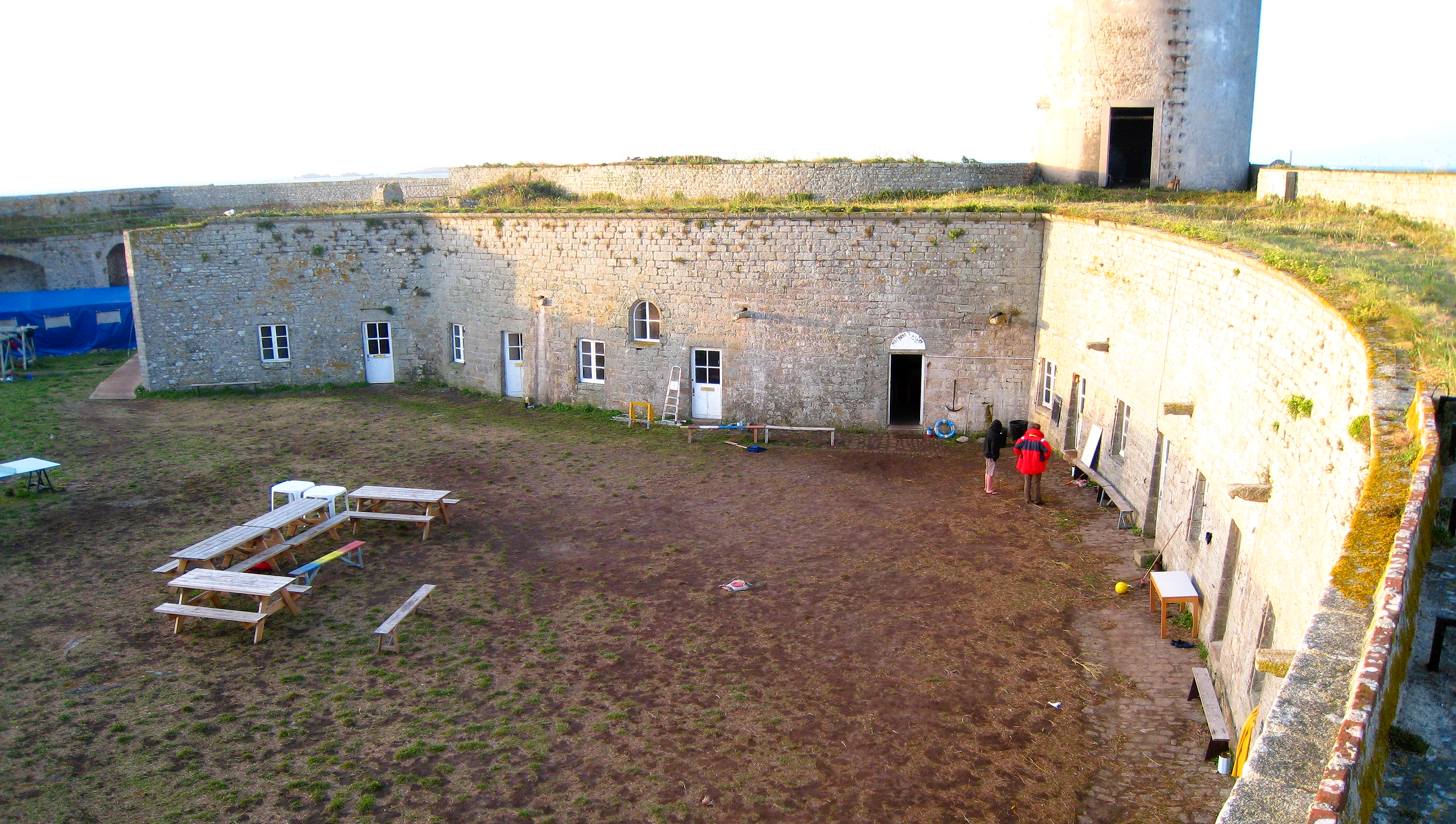 Fort Cigogne dans l'archipel de Glénan, pendant des stage des Glénans